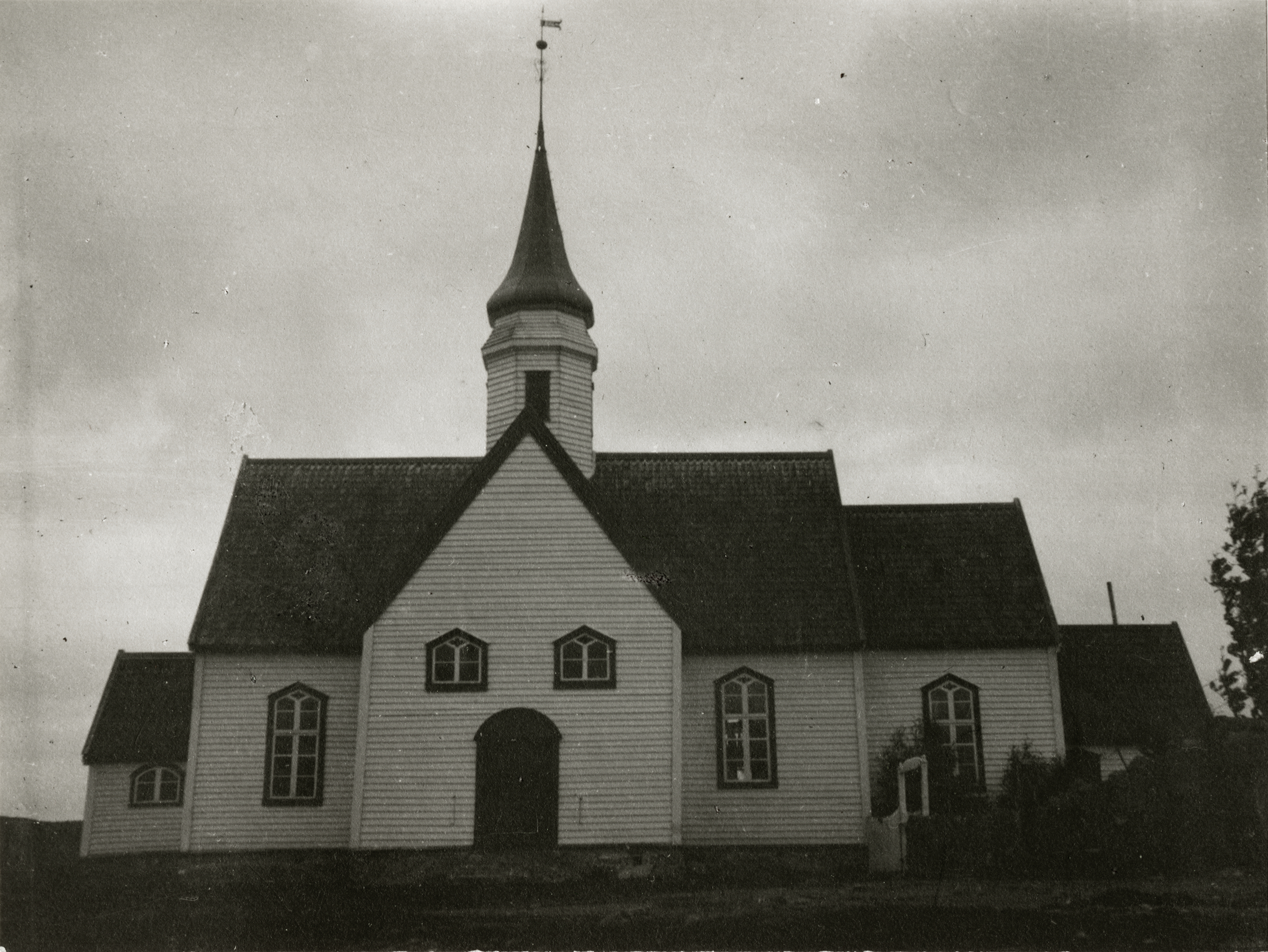 Bjarkøy kirke i Bjarkøy, Troms